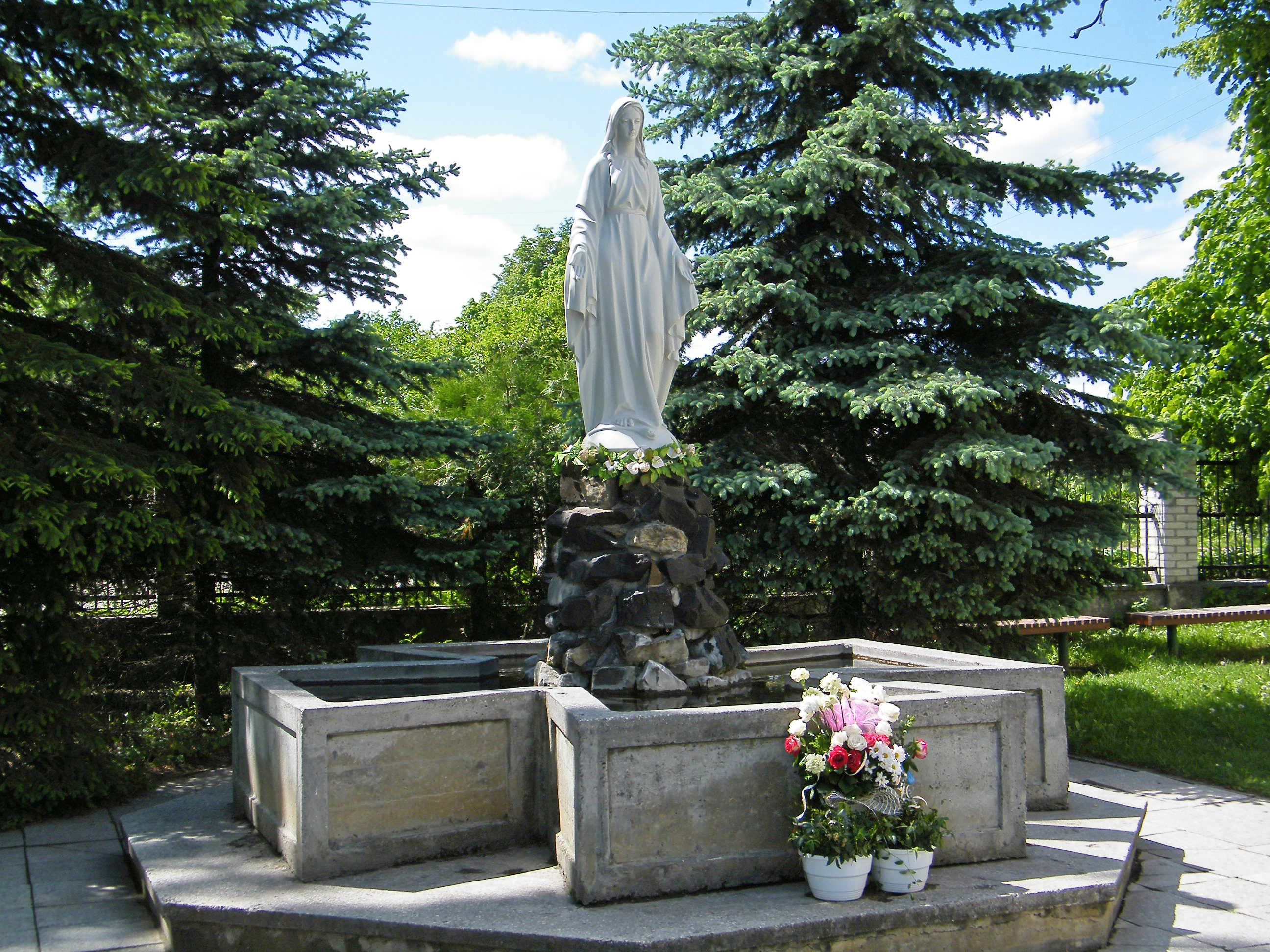 Дева Мария